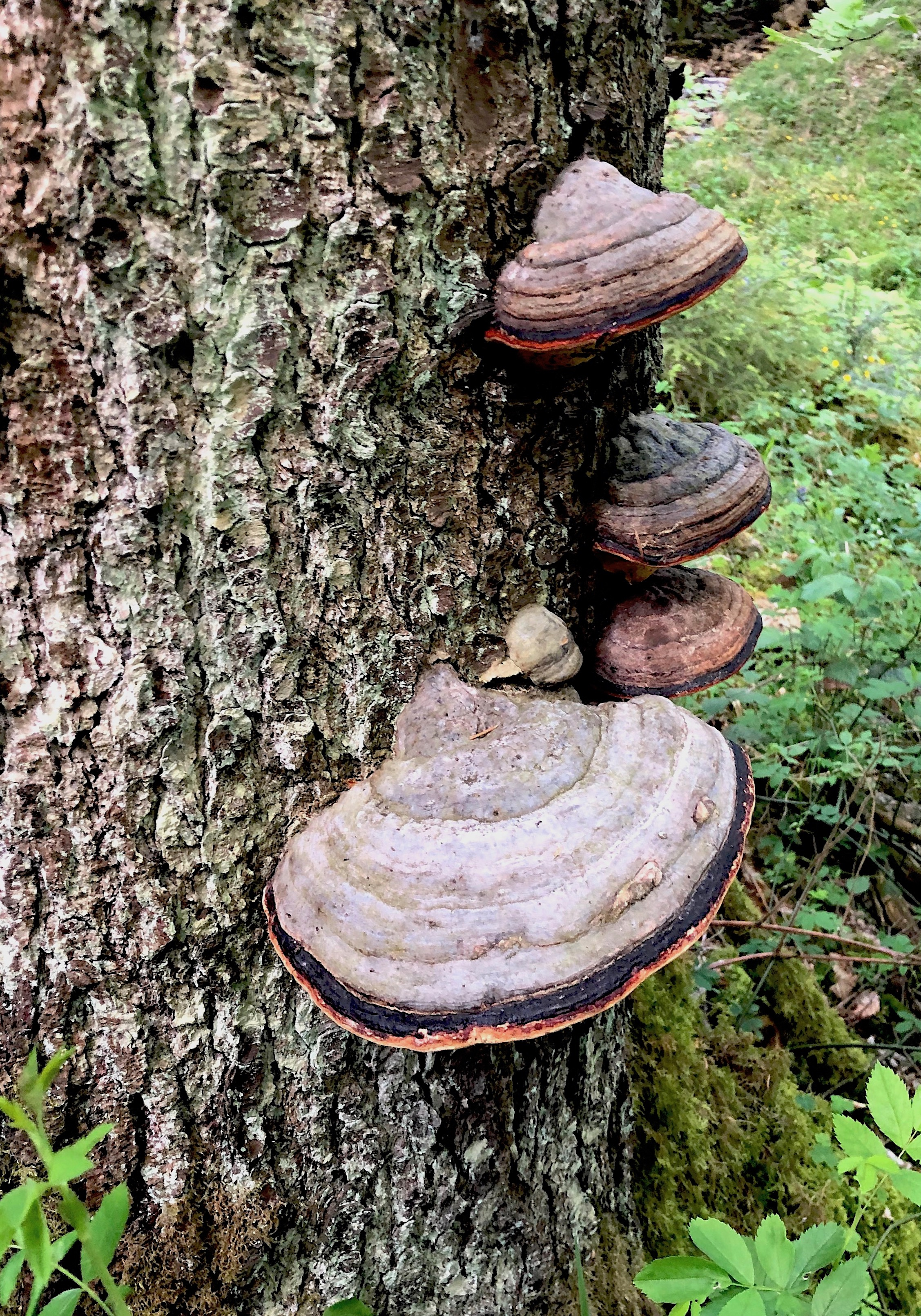 Zunderschwamm (Fomes fomentarius)